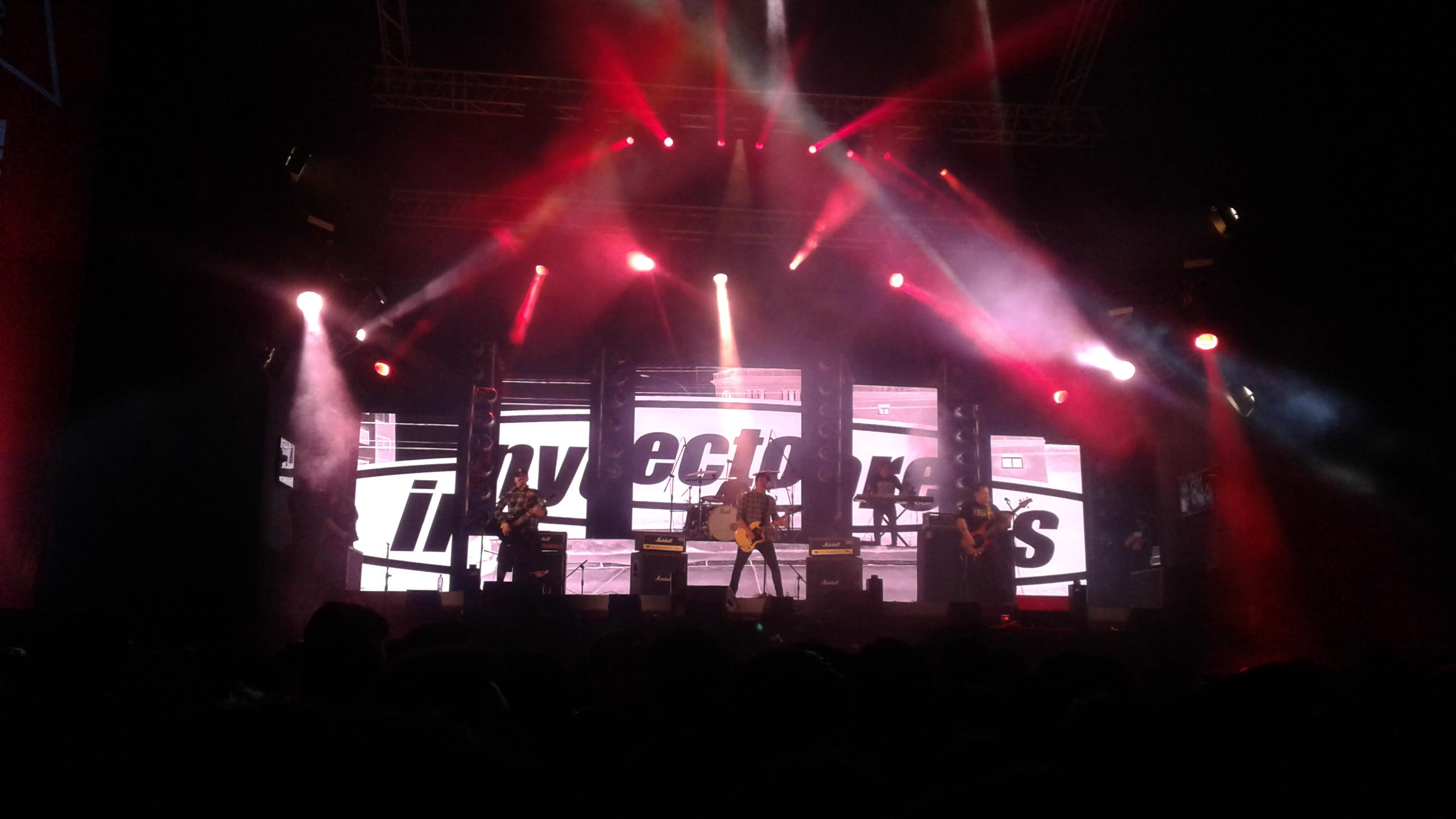 Inyectores en el Día del Rock Peruano.